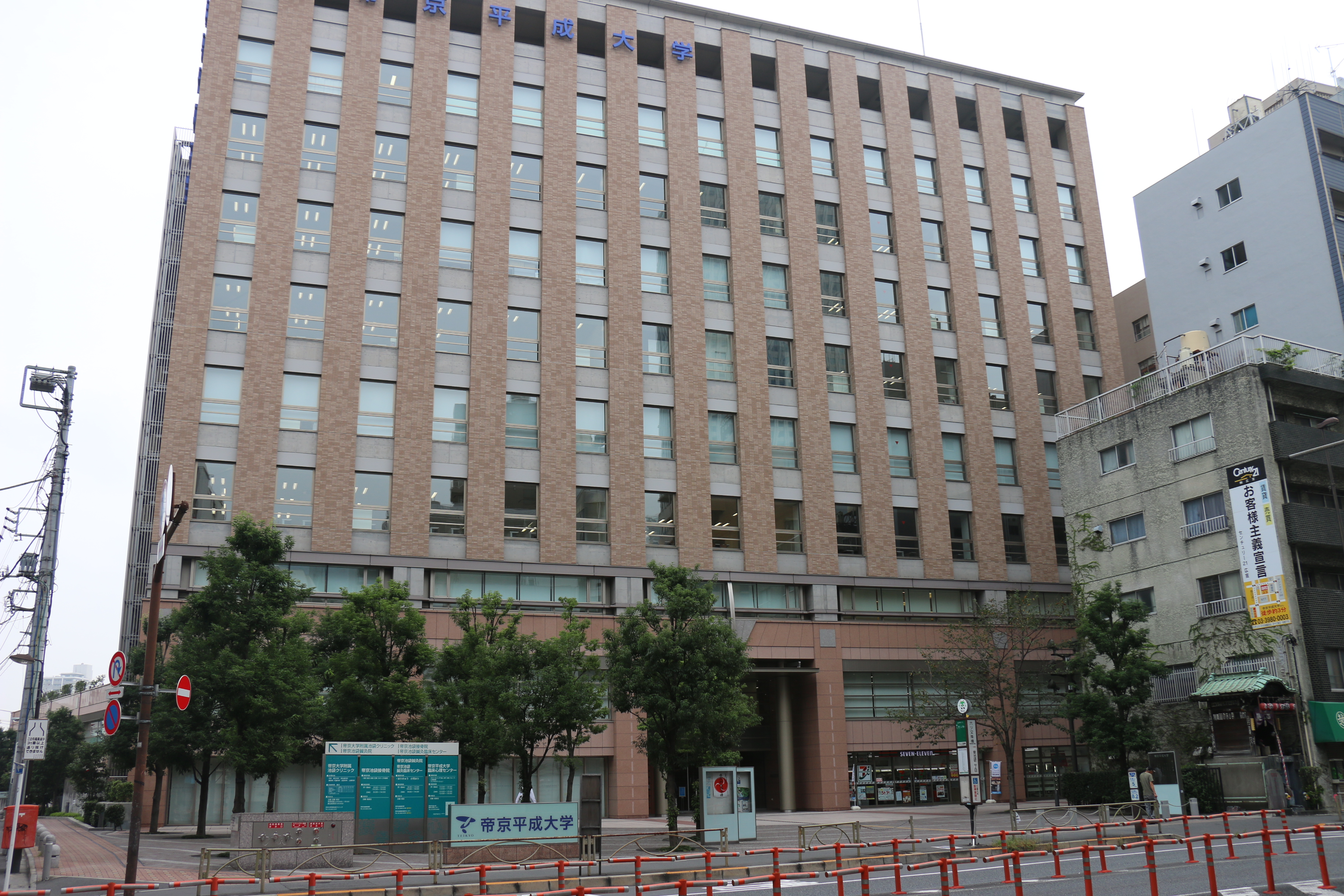 帝京平成大学池袋キャンパス